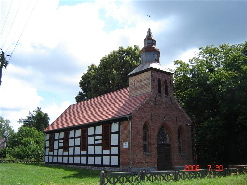 Kościół w Motarzynie - Gmina Tychowo